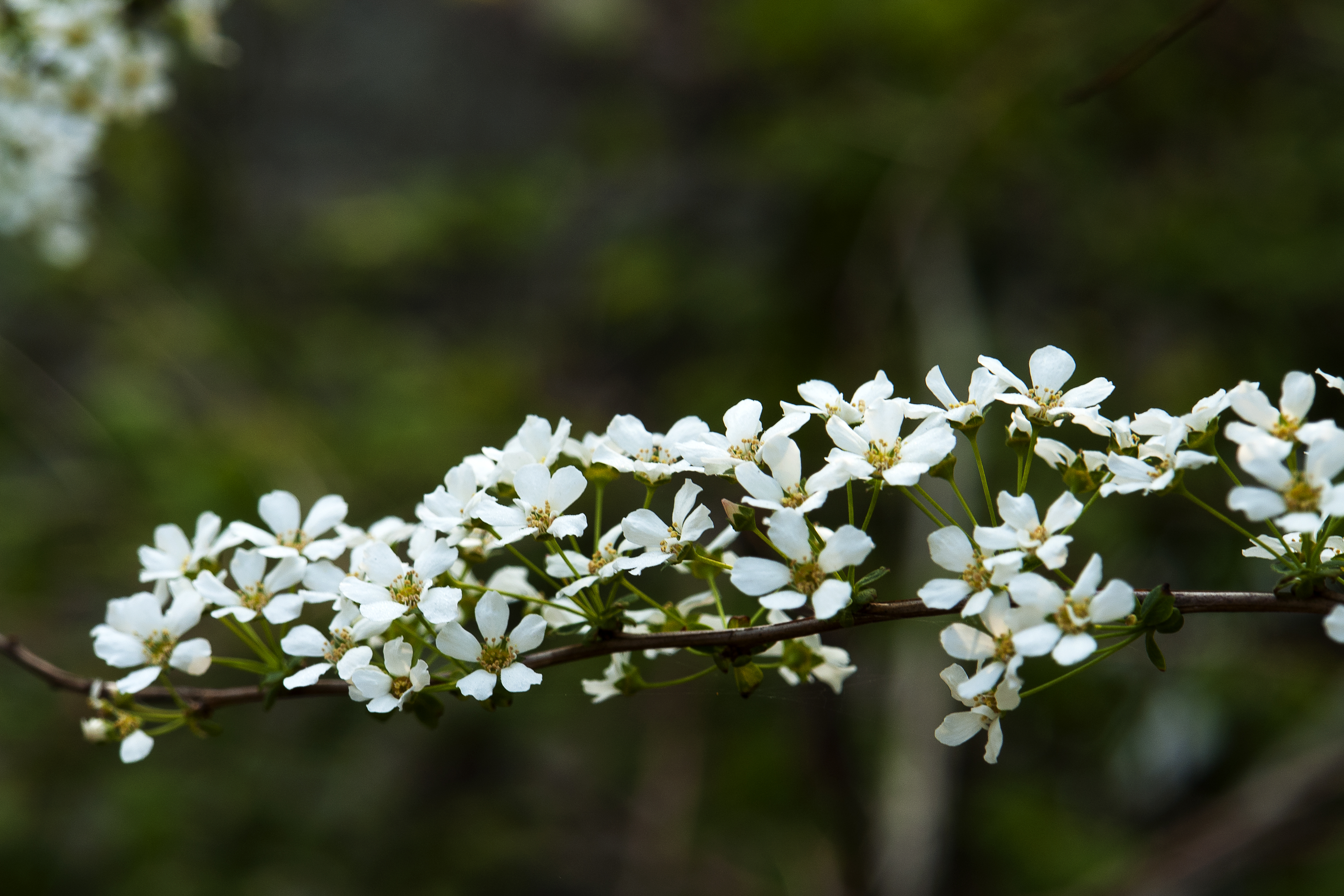 조팝나무 (Spiraea prunifolia for. simpliciflora) 2014년 4월 9일